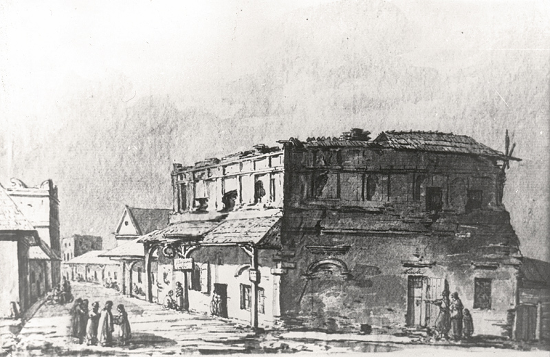 Drahomanov street 1797